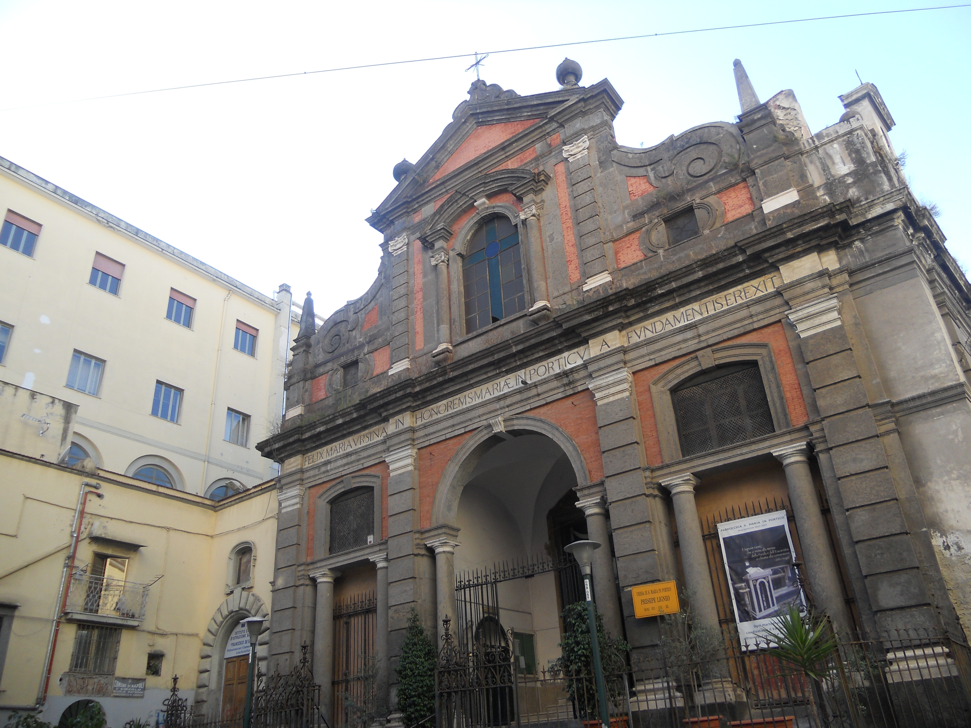 Facciata Santa Maria in Portico, Napoli